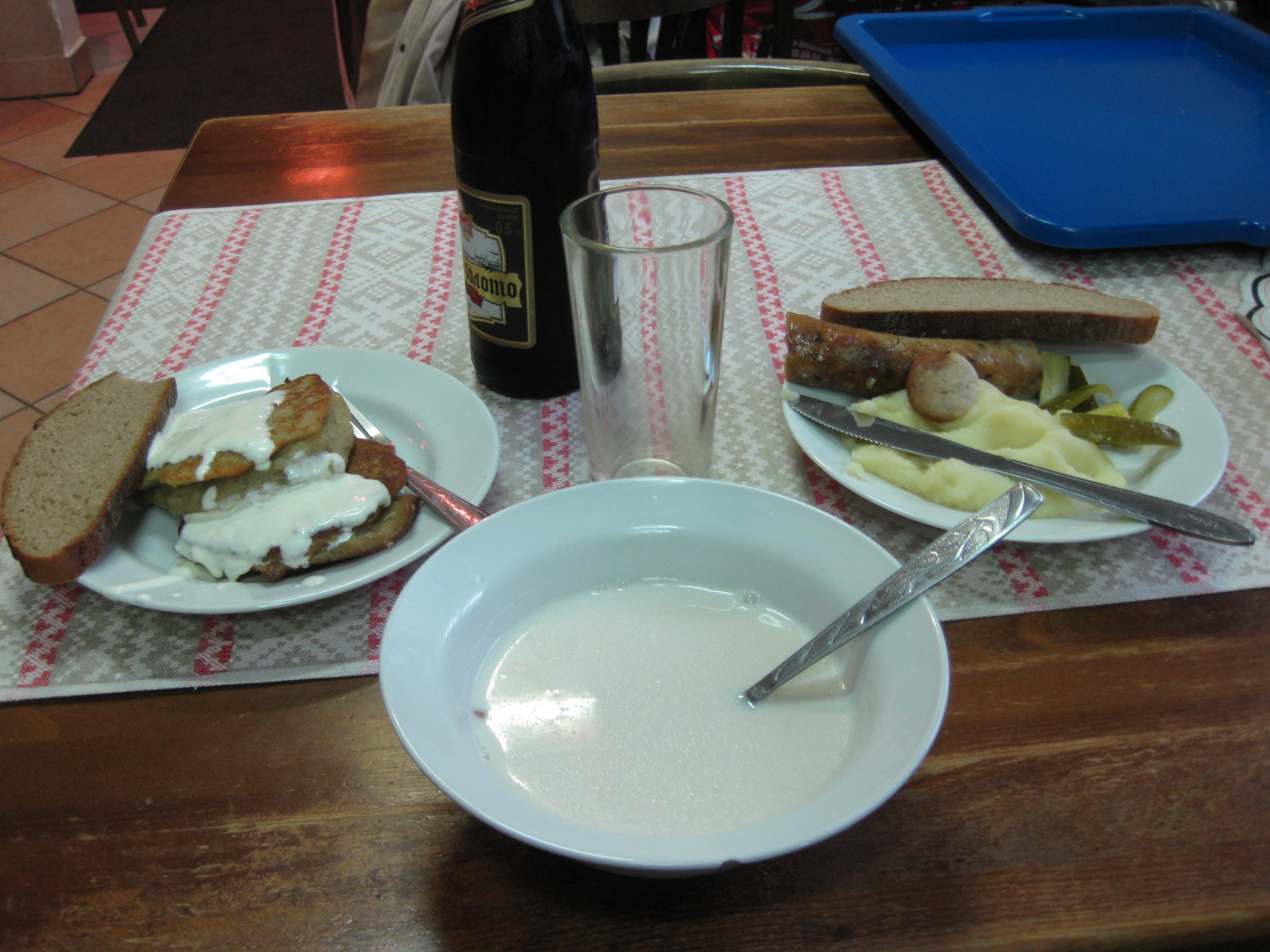 Обед в кафе в Витебске.